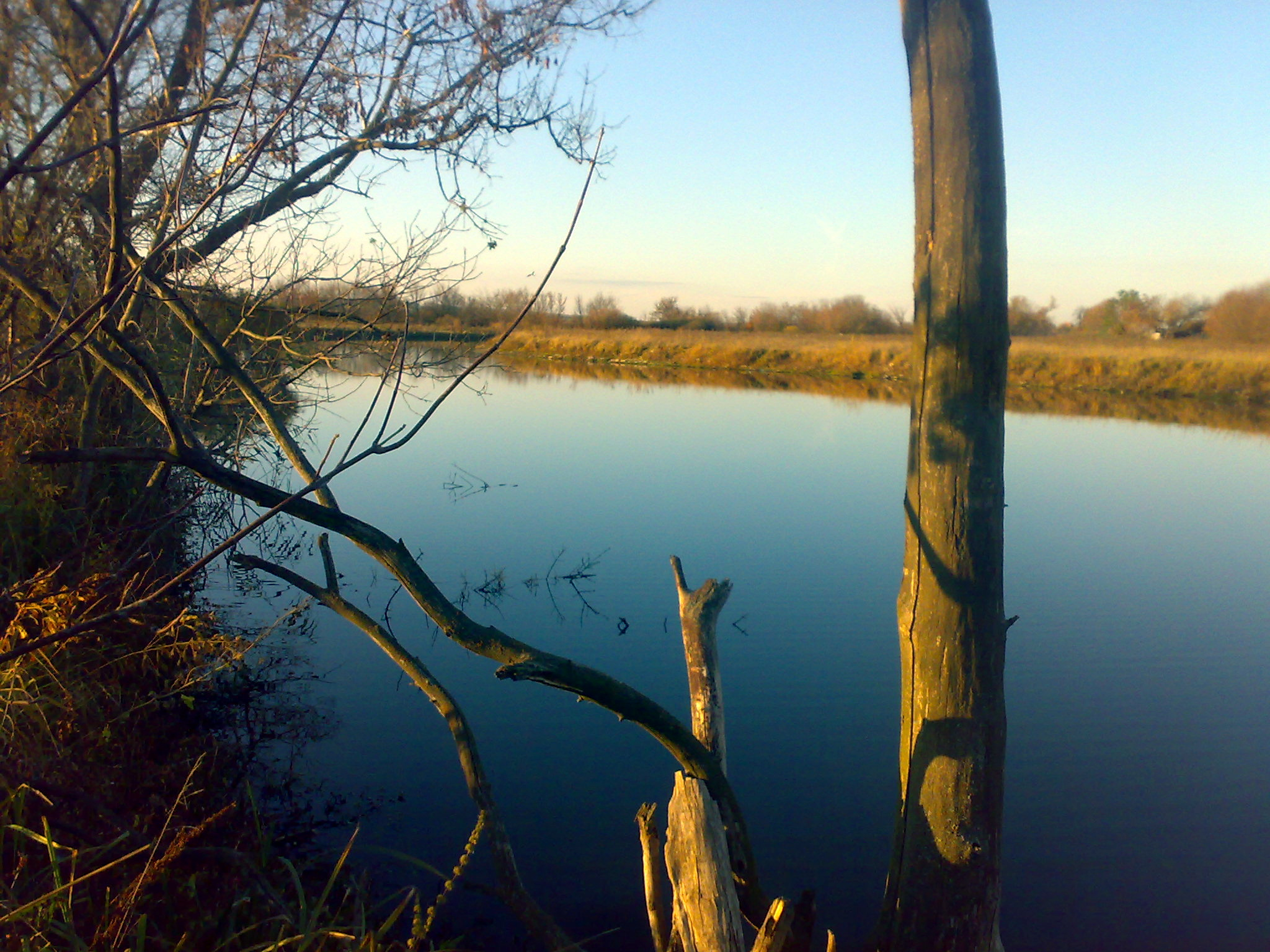 Верховья реки Калитва, в Чертковском районе Ростовской области. Неподалеку от села Маньково-Калитвенское